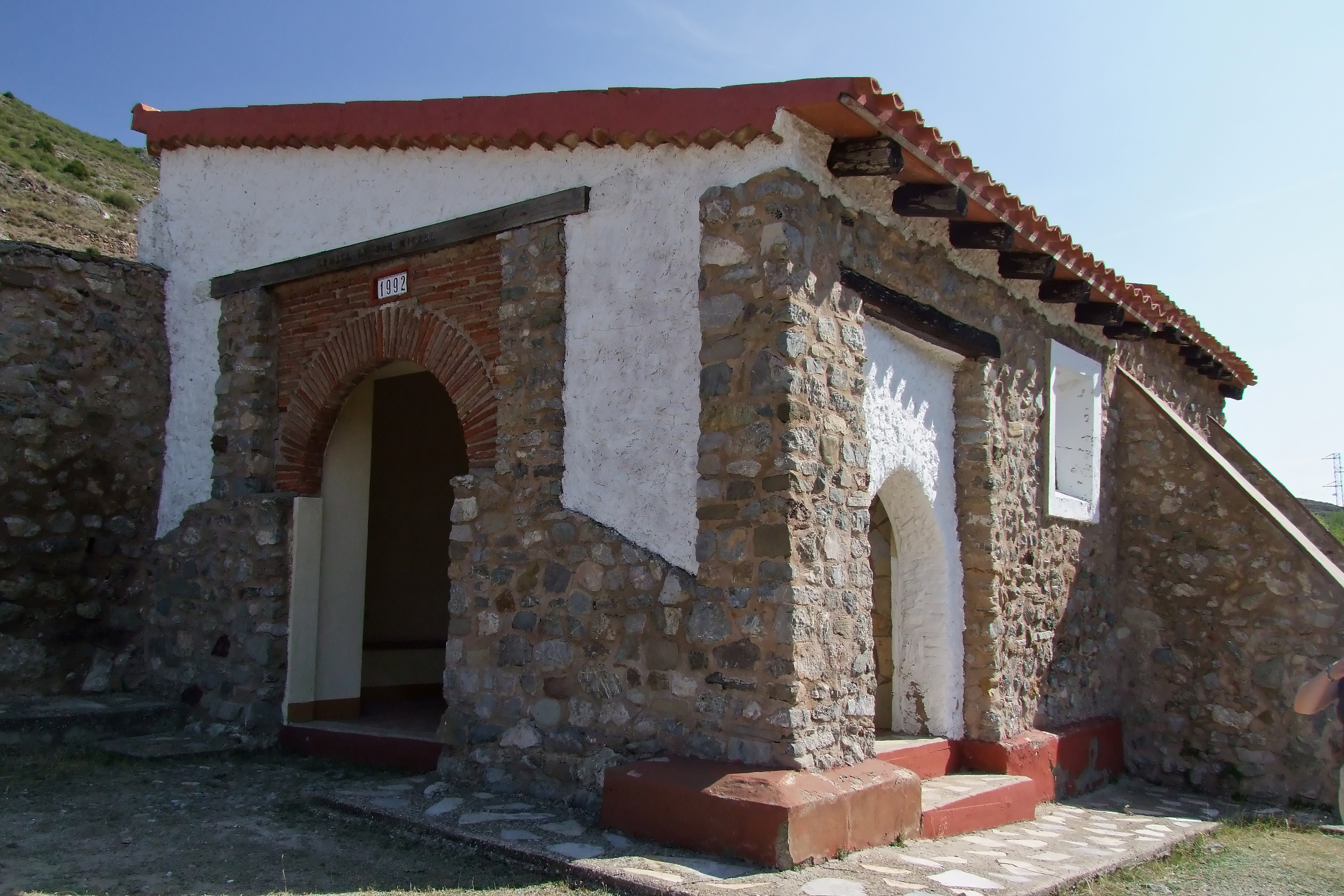 Ermita de San Miguel en la localidad de Arnedillo, La Rioja - España